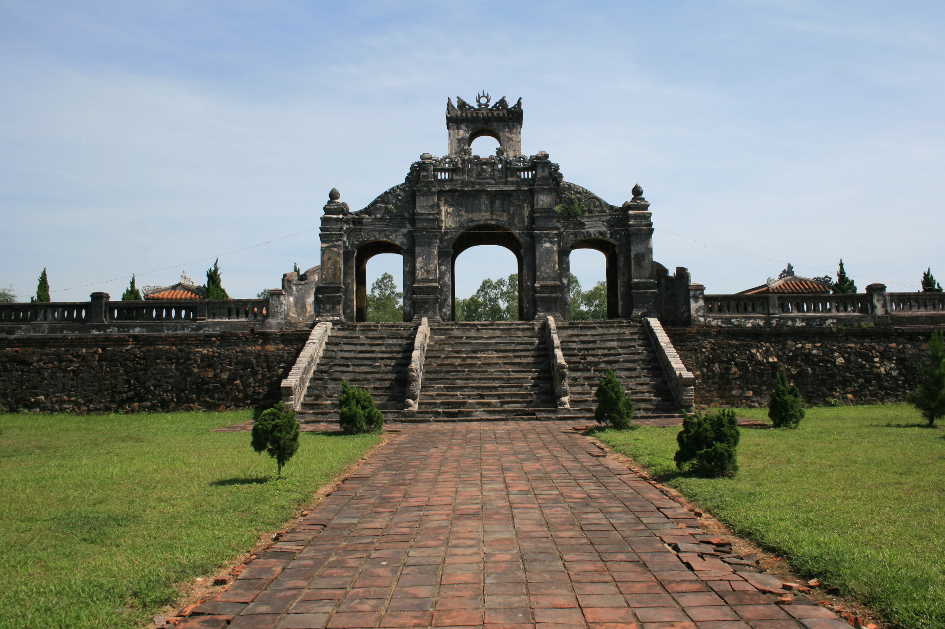 Dai Thanh gate (Đại Thành Môn). Temple of Letters, Hue (Văn Thánh Huế))